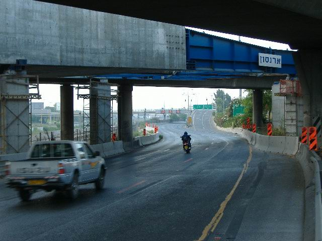 כניסה לכביש מספר 1 דרך איילון דרום.